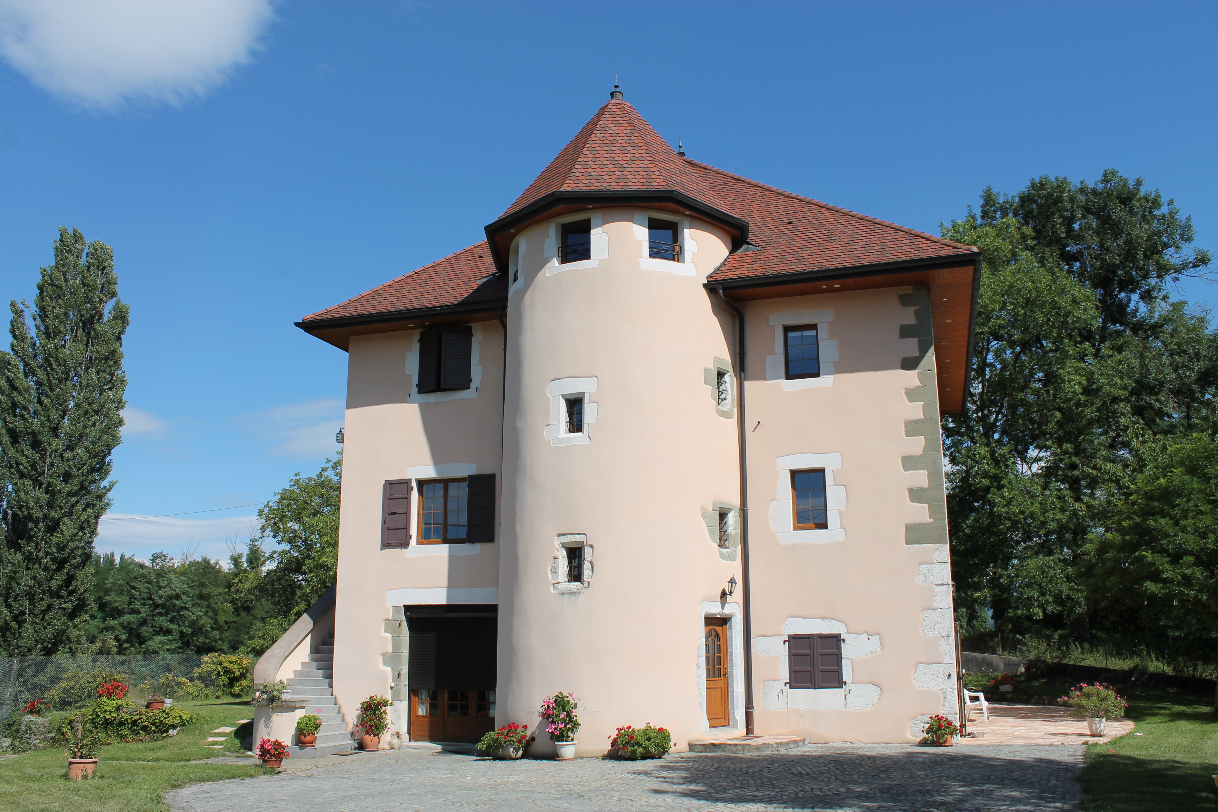 Ancien hôpital Saint-Christophe de "Hautevillette" (XIIIe s.) avec sa tour dite "la prison" appartenant aux Hospitaliers d'Hauteville-sur-Fier (Haute-Savoie).